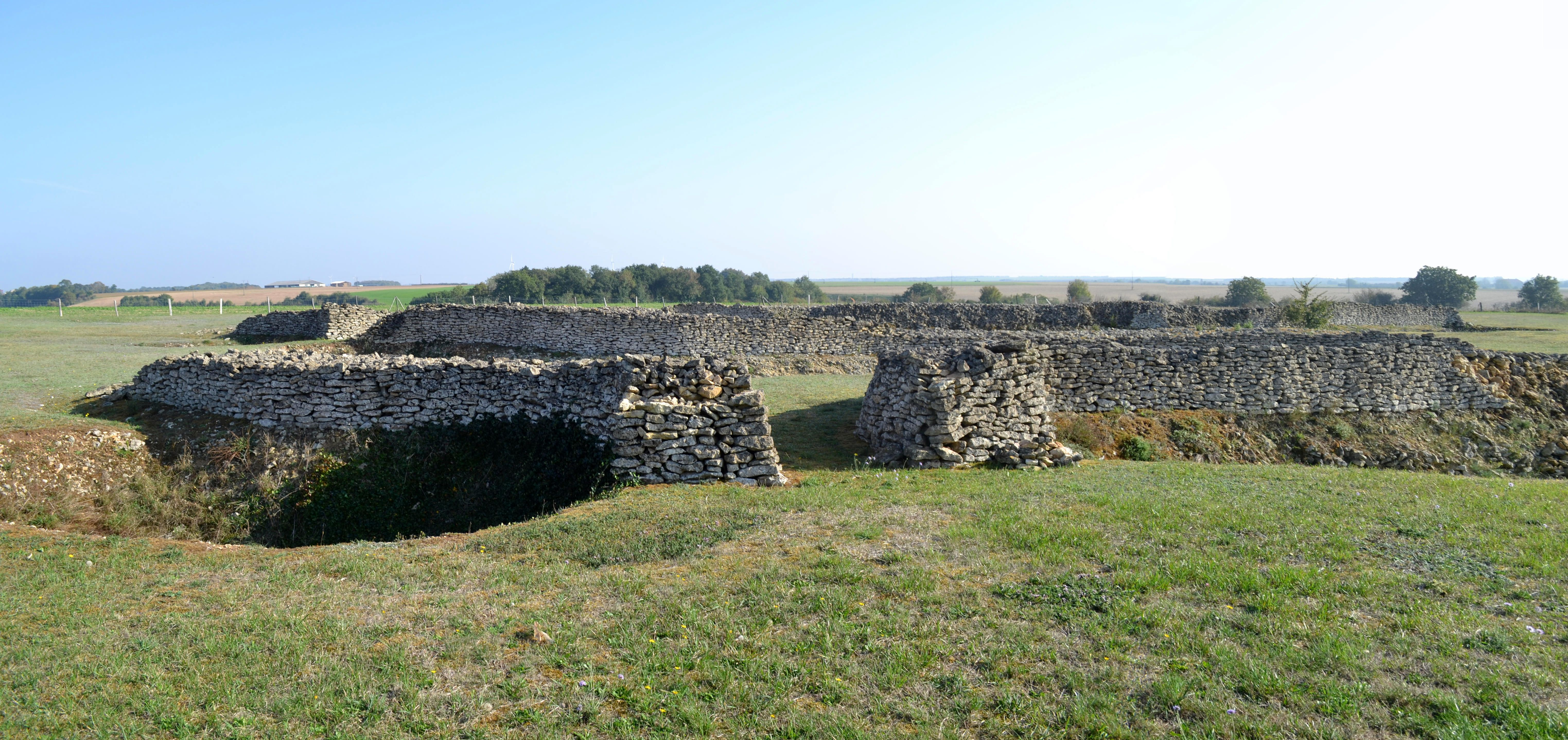 Enceinte préhistorique de Champ Durand à Nieul-sur-l'Autise (85).